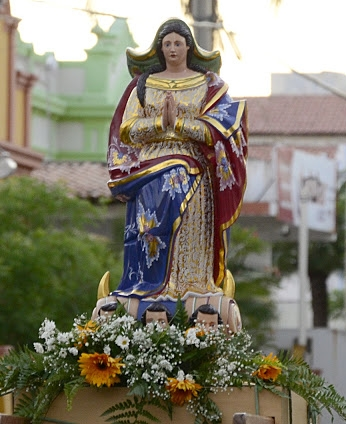 Imagem da Padroeira de Alexandria